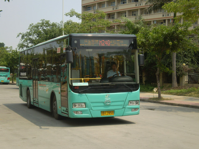 中文（中国大陆）: 深圳公交M240路五洲龙客车FDG6111HEVG2（二级踏步版）